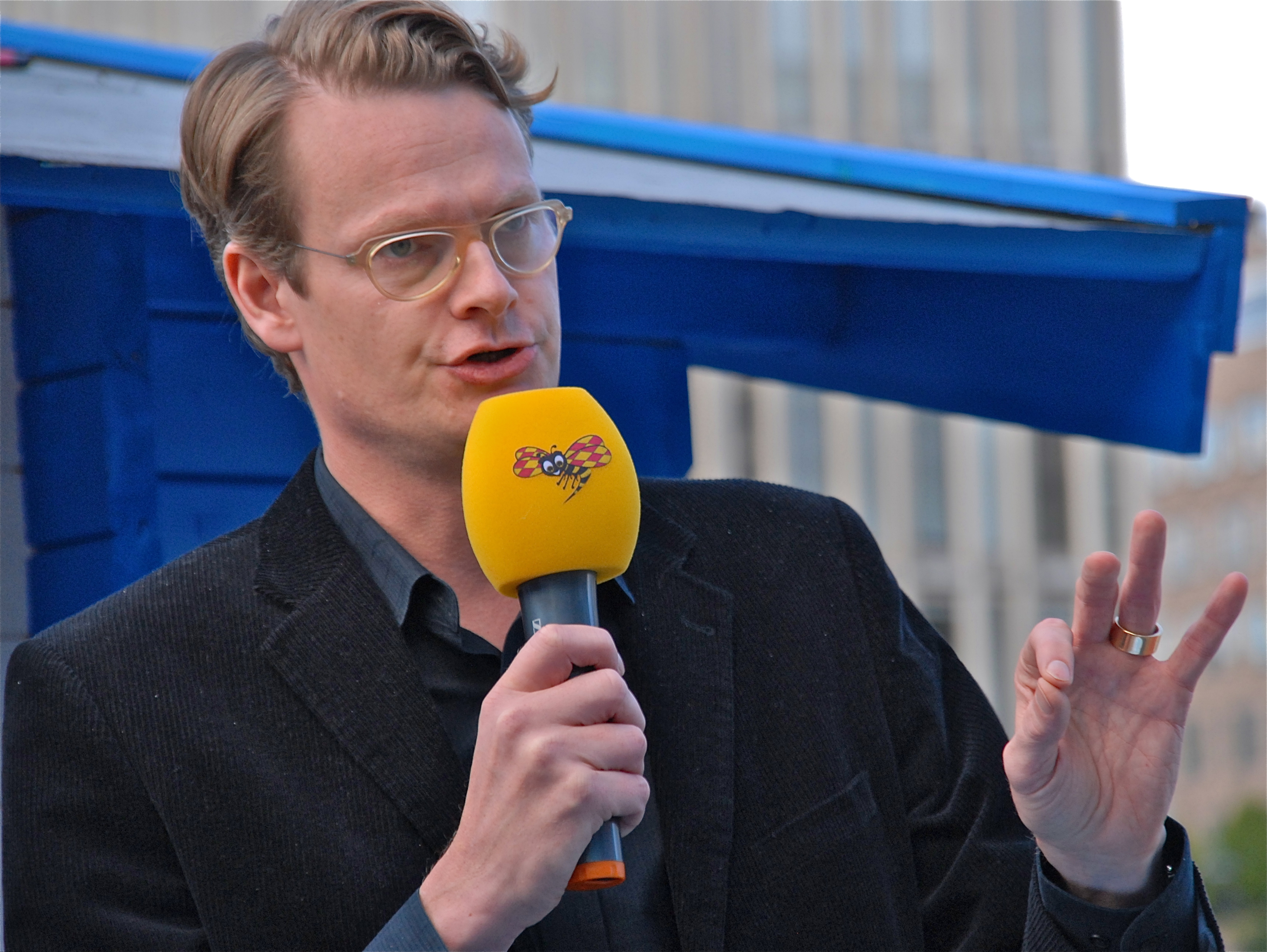 Per Schlingmann inför valet 2010